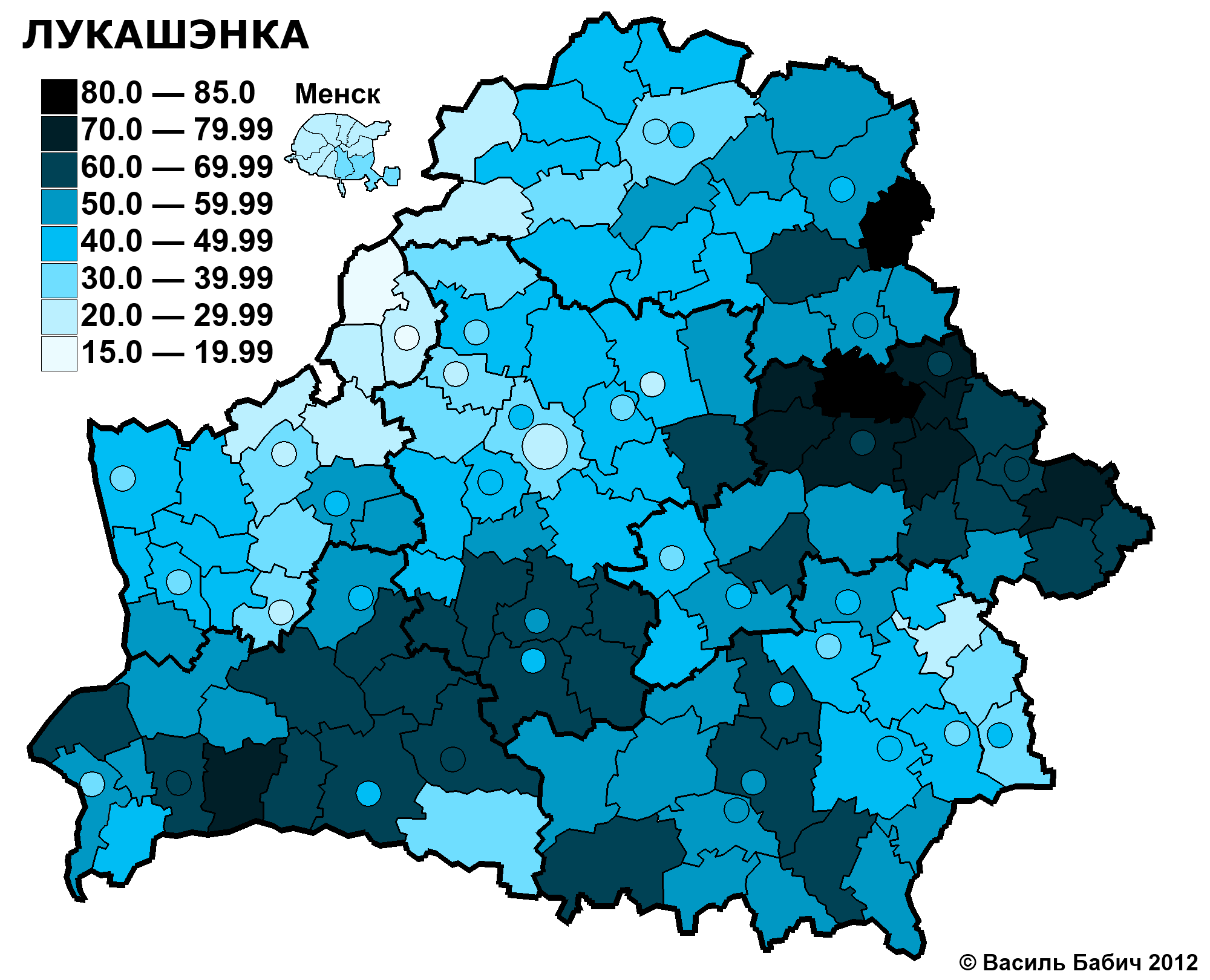 Беларуская (тарашкевіца): Выбары прэзыдэнта Беларусі 1994 года. Першы тур. Аляксандар Лукашэнка.